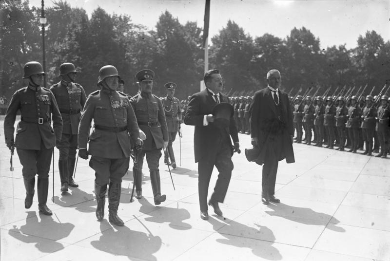 Die Verfassungsfeier in Berlin am 11. August 1923. Reichspräsident [Friedrich] Ebert und Reichswehrminister [Otto] Gessler schreiten die Front der Ehrenkompanie ab. [Text Neuherausgabe Dez. 1930:] 10 Jahre deutsche Reichswehr! Der erste Oberbefehlshaber der deutschen Reichswehr, der verstorbene Reichspräsident [Friedrich] Ebert beim Abschreiten einer Ehrenkompagnie auf dem Platz der Republik in Berlin